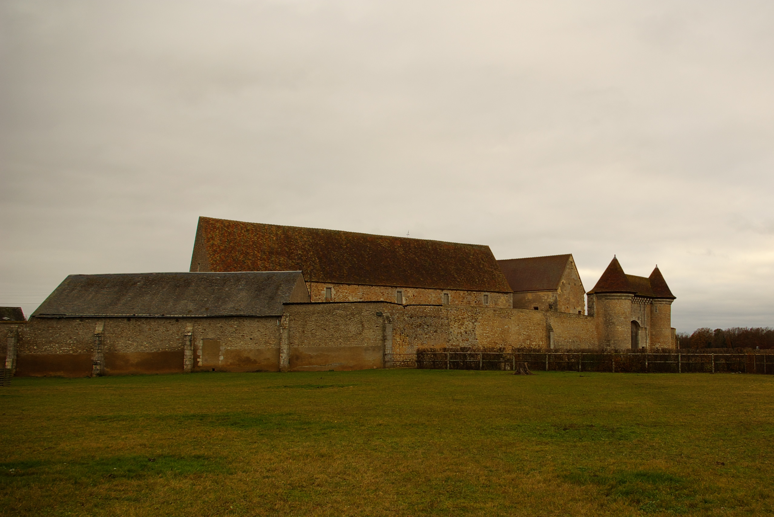 Abbaye de Nottonville en Eure et Loir